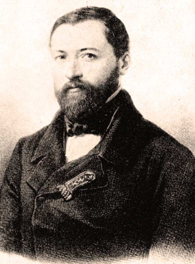 Elzéar Pin, député de Vaucluse